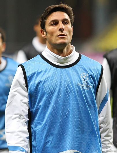 Zanetti con la casacca della Champions League